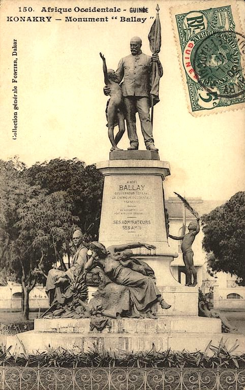 Carte postale "Monument à Noël Ballay, Conakry" (Guinée-Conakry), bronzes de Henri Allouard (1908).